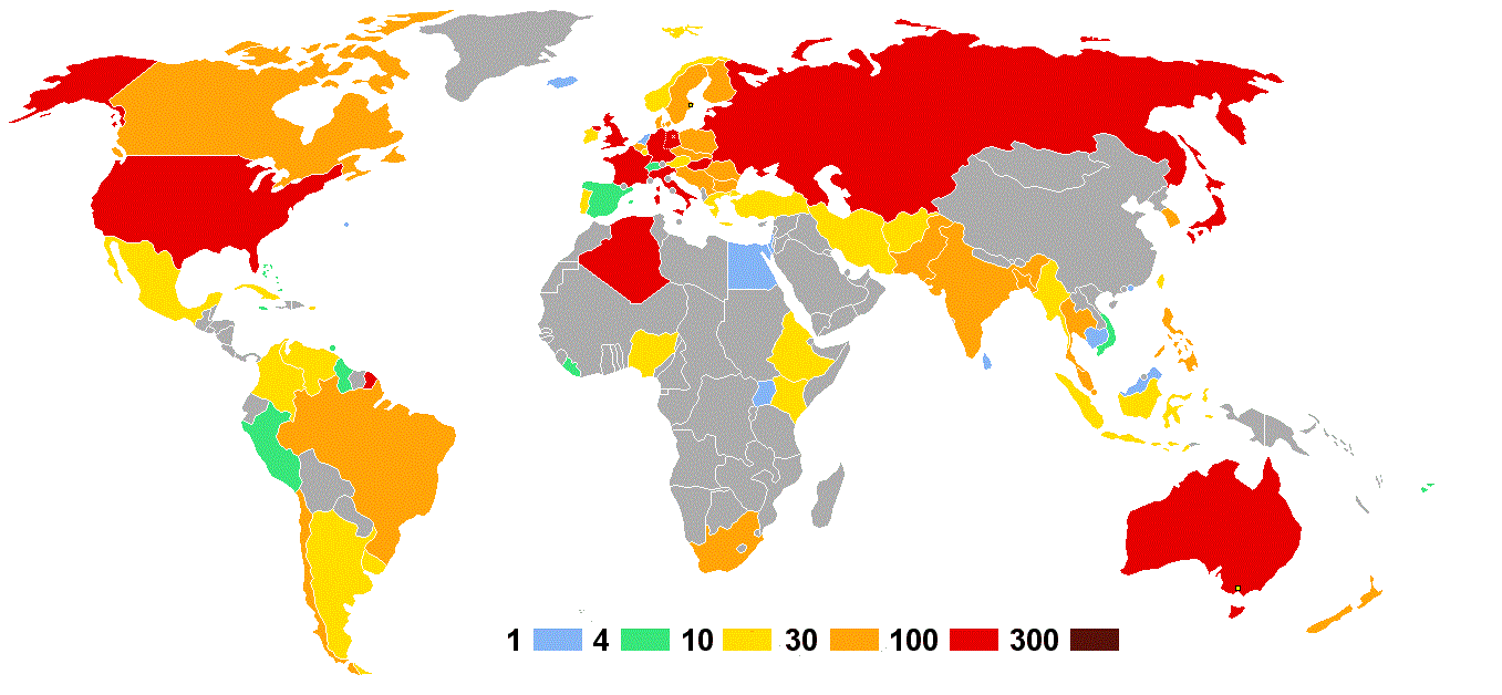 Olympische Sommerspiele 1956 — Anzahl der Athleten